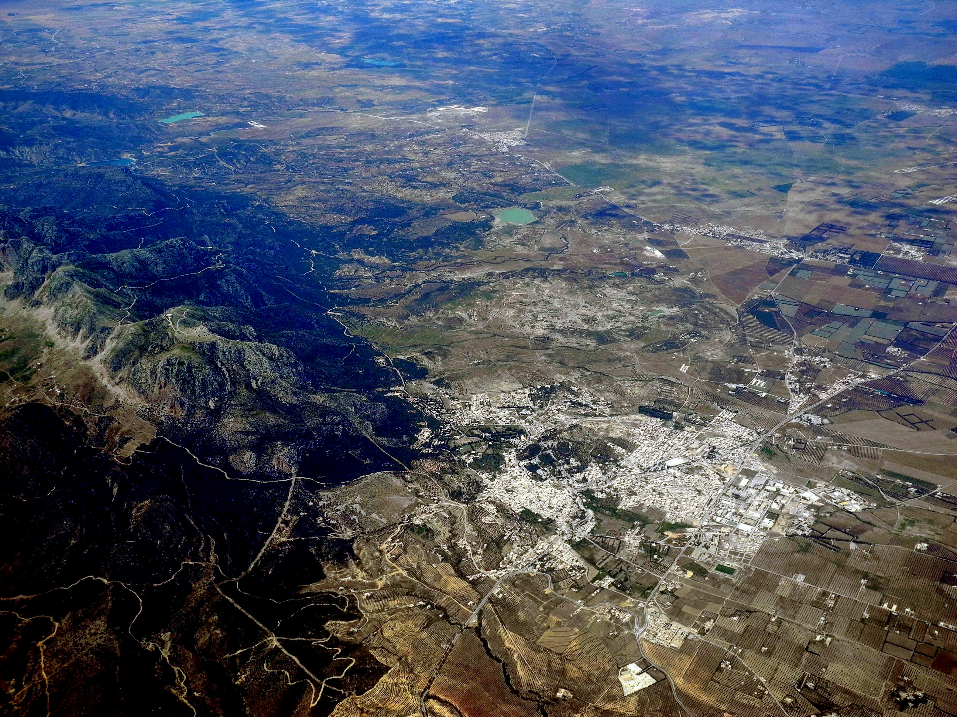 Zaghouan et son Jbel vus d'avion